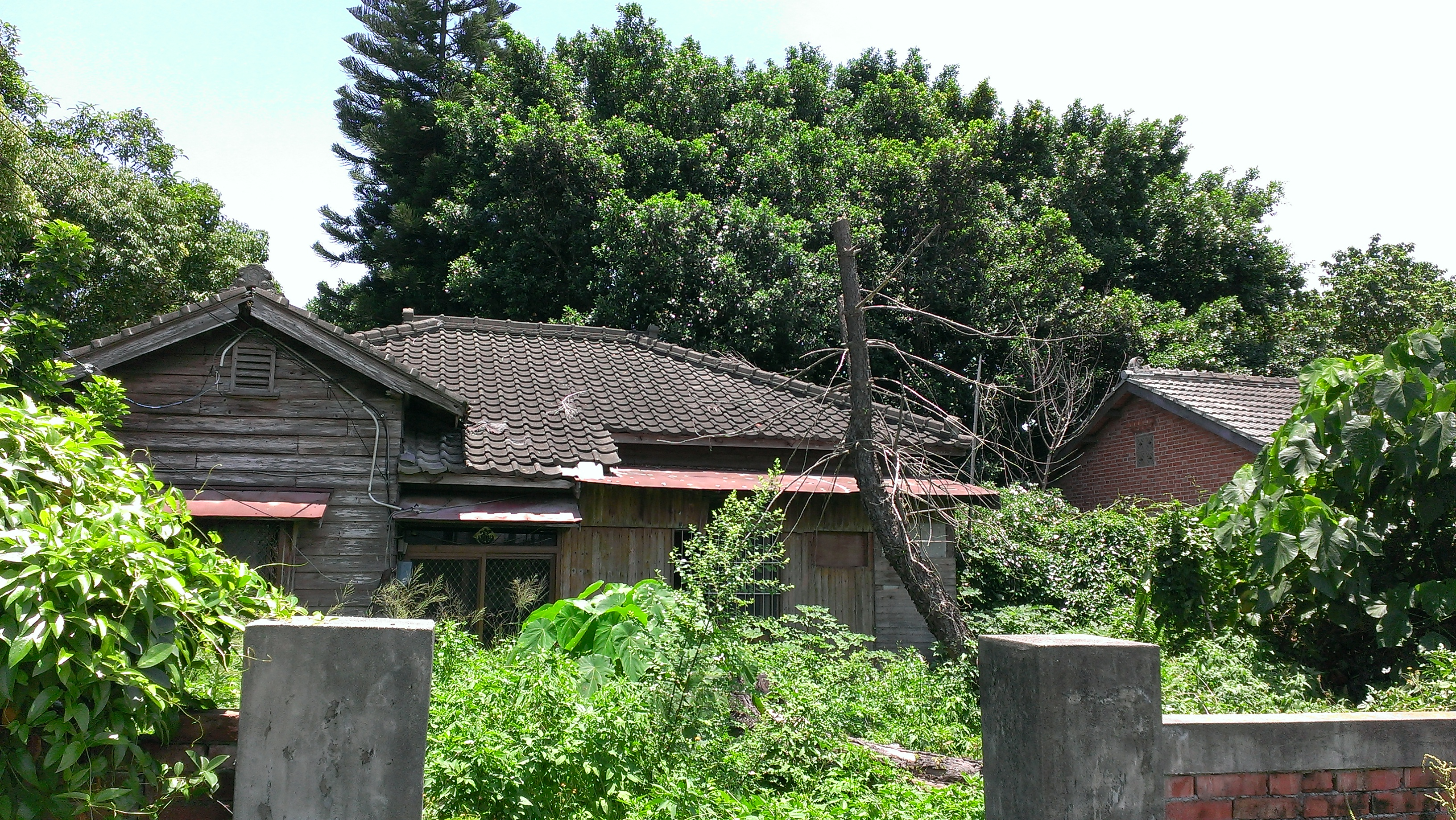 雲林縣歷史建築──崙背分駐所宿舍群